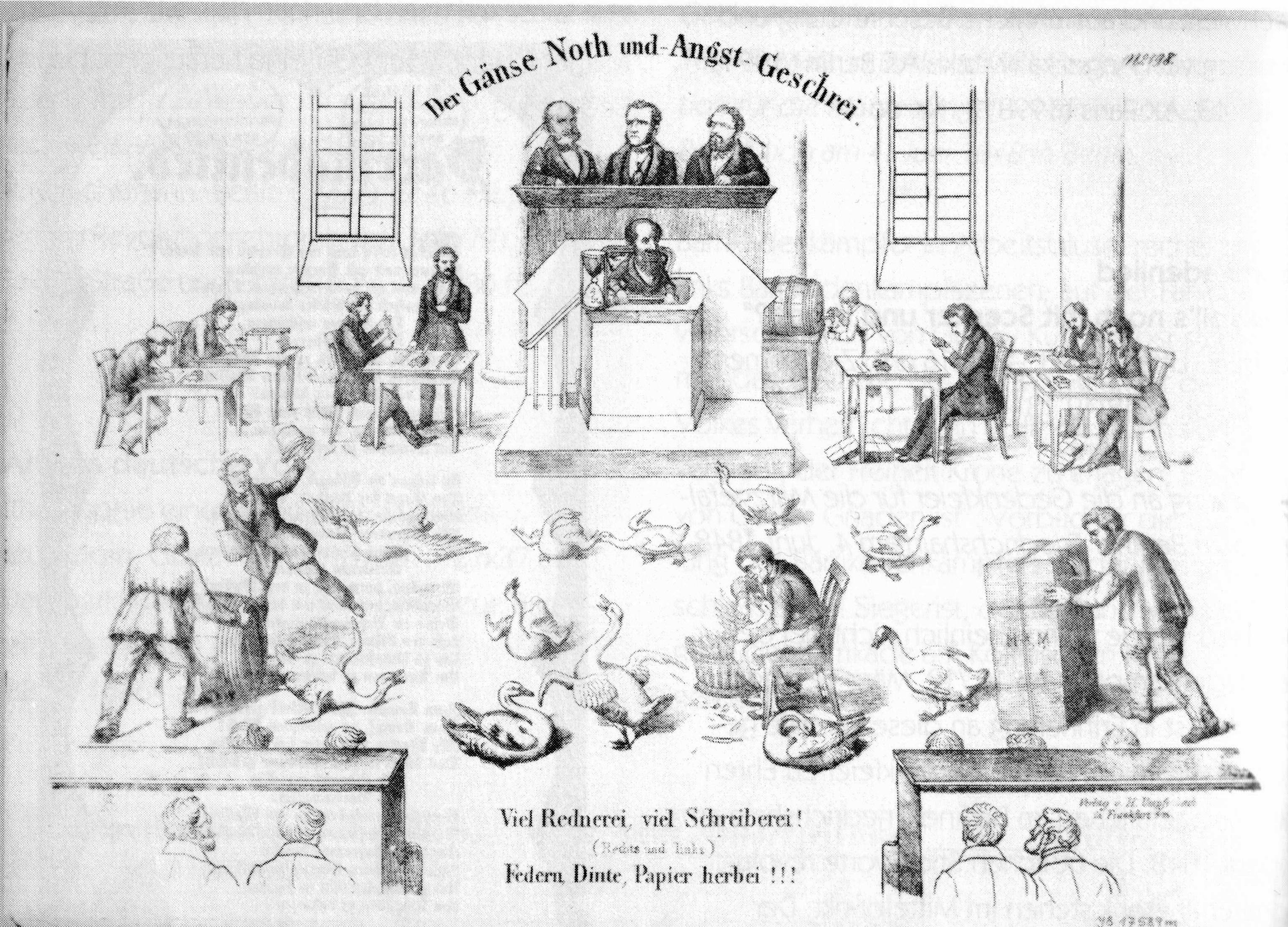 Lithographie, Adolf Schroedter. Frankfurt, 1848. “Der Gänse Noth und Angst-Geschrei”. Karikatur auf die Antragsflut in der Paulskirche, für die viele Schreibfedern von Gänsen benötigt werden.